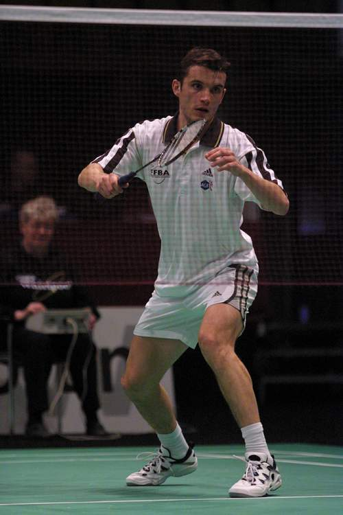 Thomas Cup 2002 France-Pologne